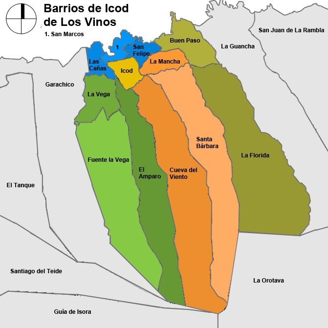 Barrios de Icod